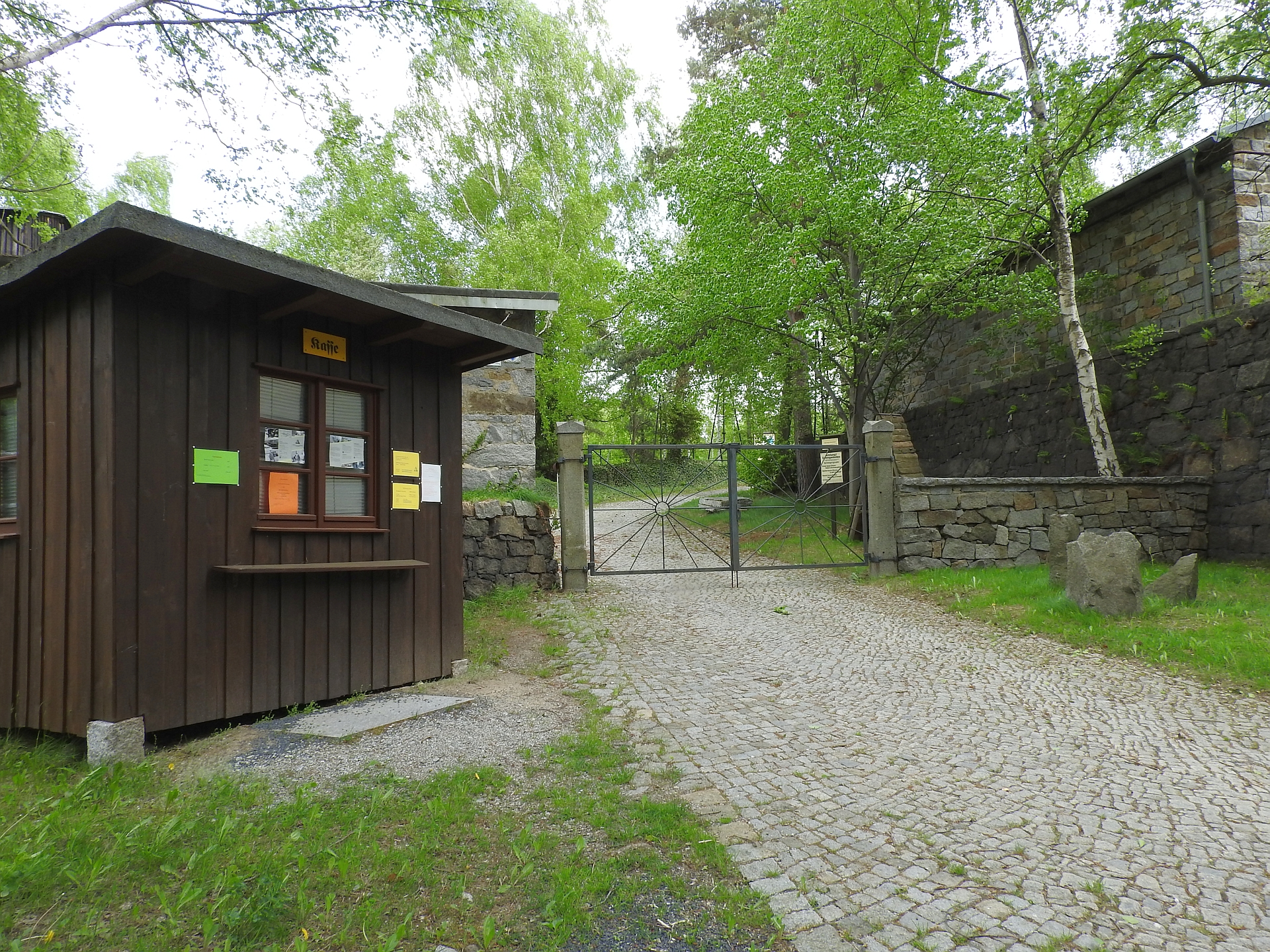 Schauanlage und Museum der Granitindustrie, Haselbachtal/Häslich, 30.04.2018